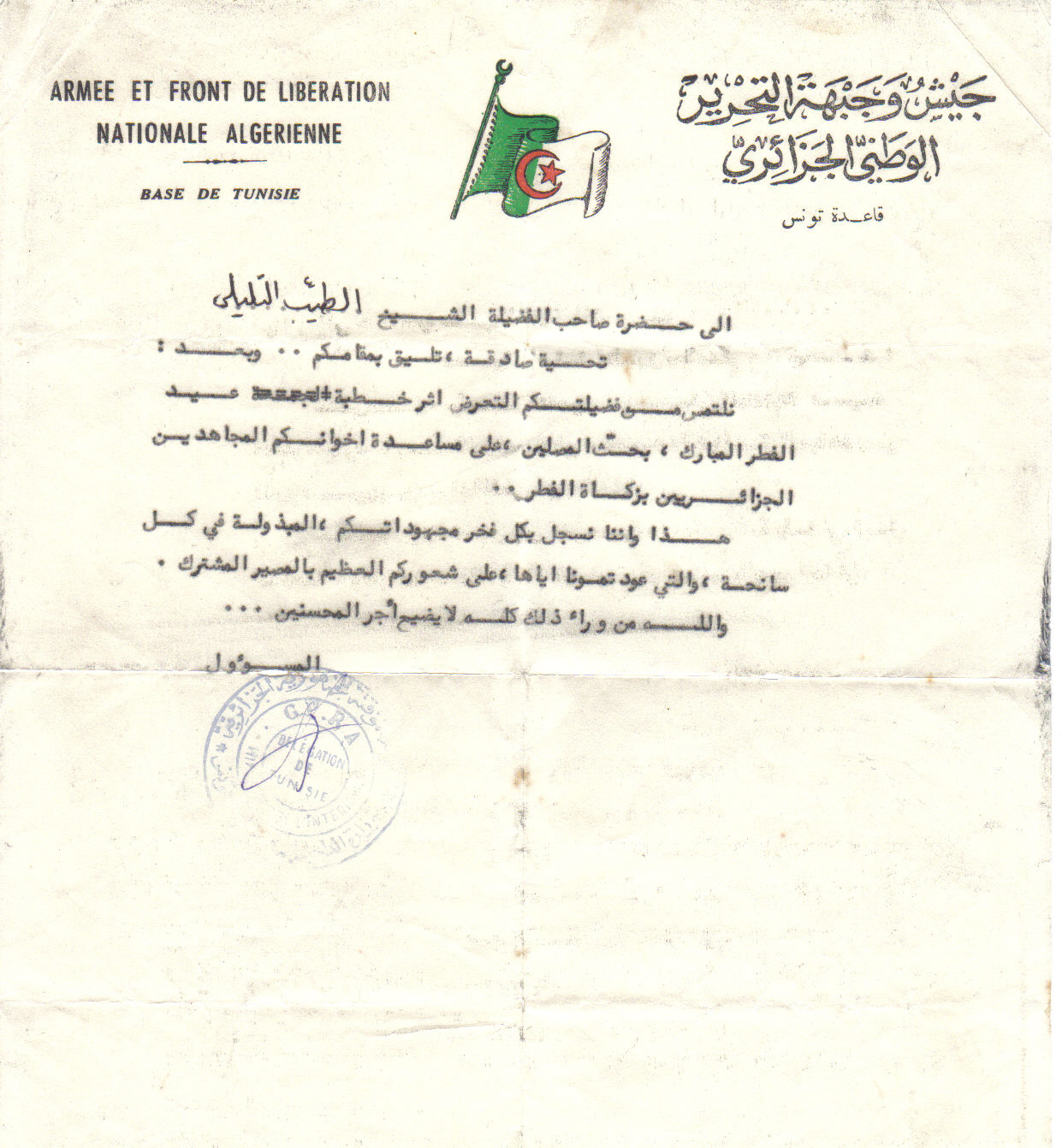 الرسالة الجزائرية إلى الشيخ